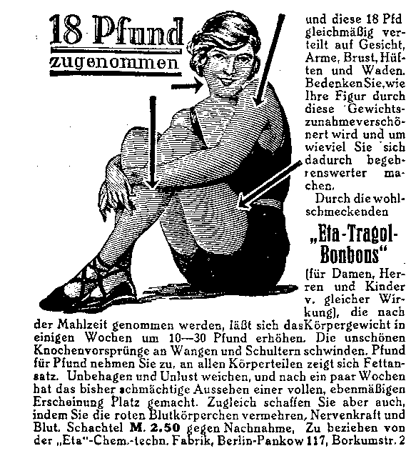 Schönheitsideal 20er Jahre, Werbung für ETA-Tragol-Bonbons